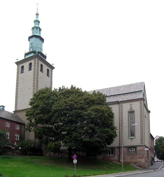 Margaretakyrkan, Hammersborg, Oslo. Built 1925. Architect: Lars Wahlman.